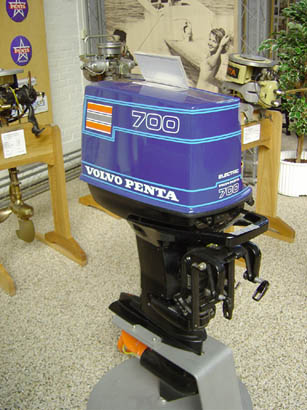 Volvo Penta, båtmotor, 700 OBS! Bild som är uppladdad av Mangan2002 är tagen av Mangan2002!